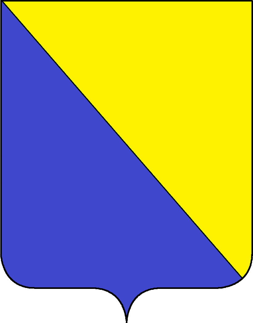 Stemma della famiglia Soranzo, appartenente al patriziato di Venezia.